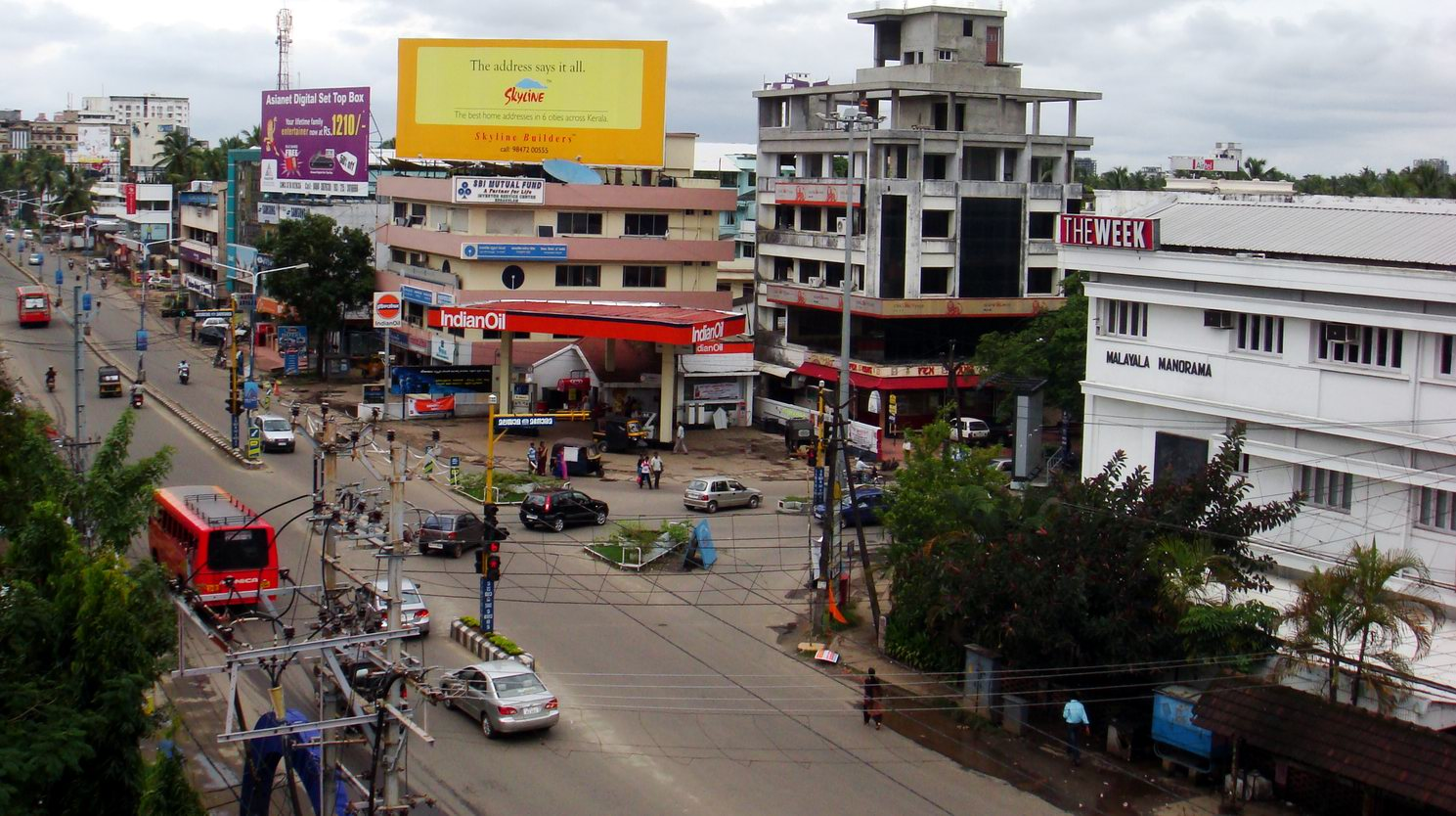 മനോരമ‌ജങ്ഷൻ